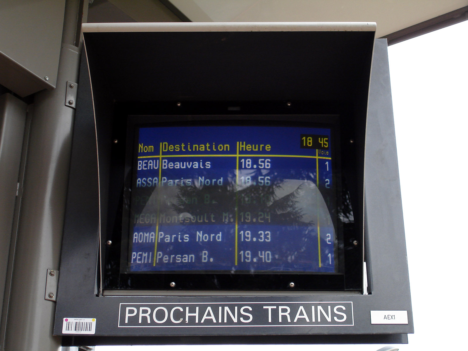 La gare d'Écouen - Ézanville à Ézanville, Val-d'Oise, France.